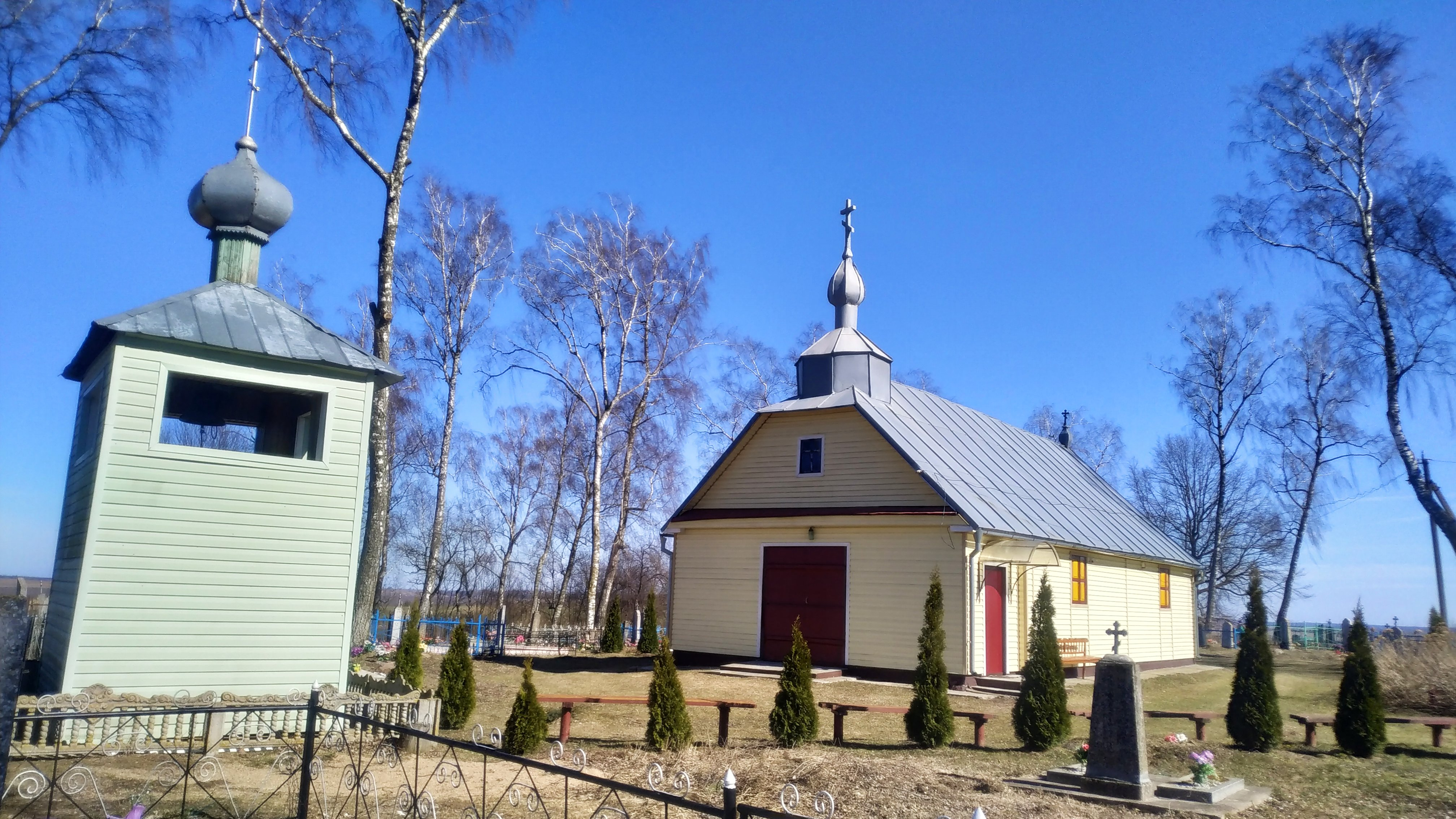 Свята-Уваксрасенская царква (2019 г.)